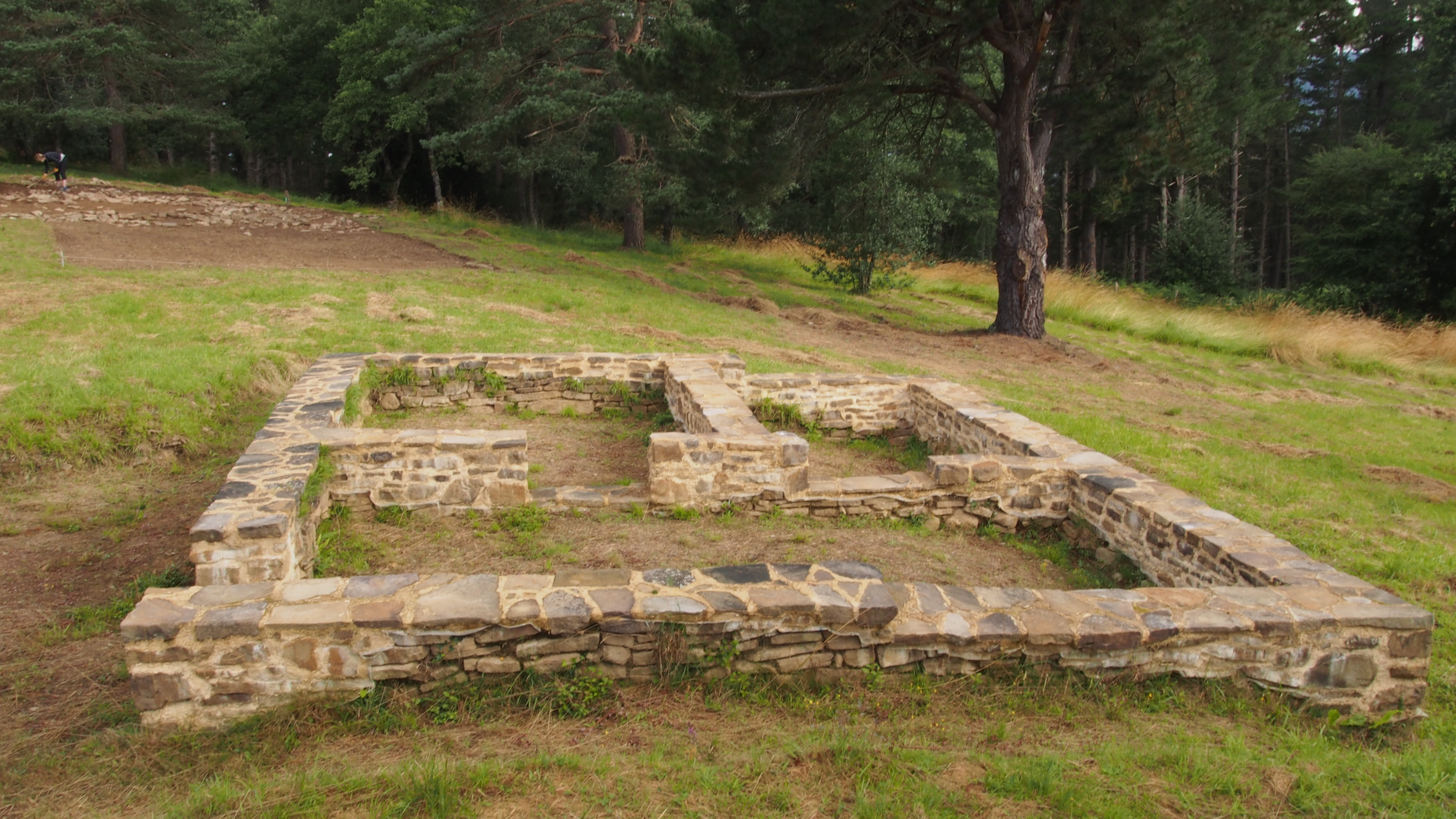 Aztarnategi eremuko ipar ekialdean dagoen eraikin txikia